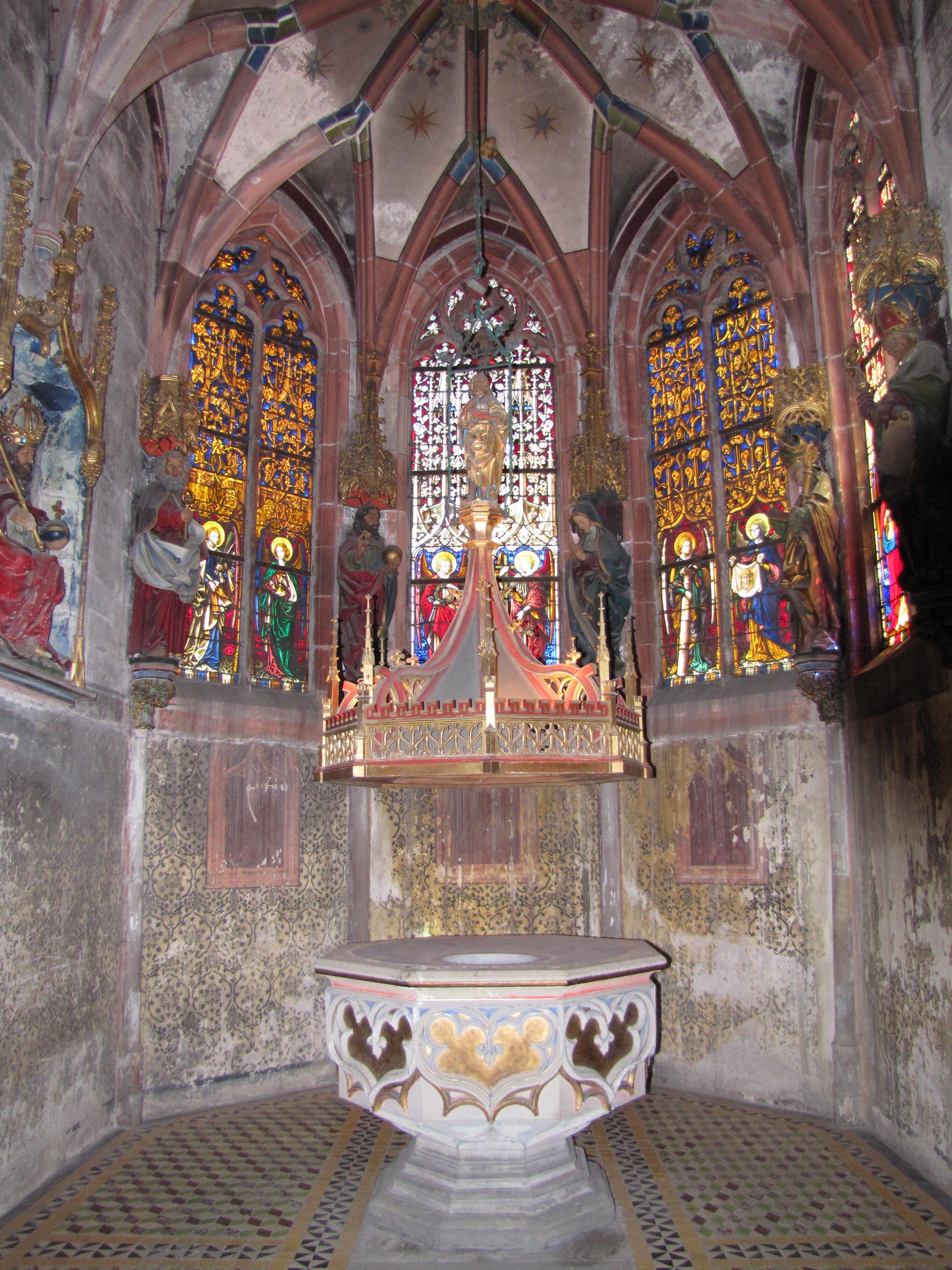 Alsace, Bas-Rhin, Église protestante Saint-Pierre-le-Jeune de Strasbourg (PA00085030). Chapelle de la Trinité avec fonts baptismaux du XVe